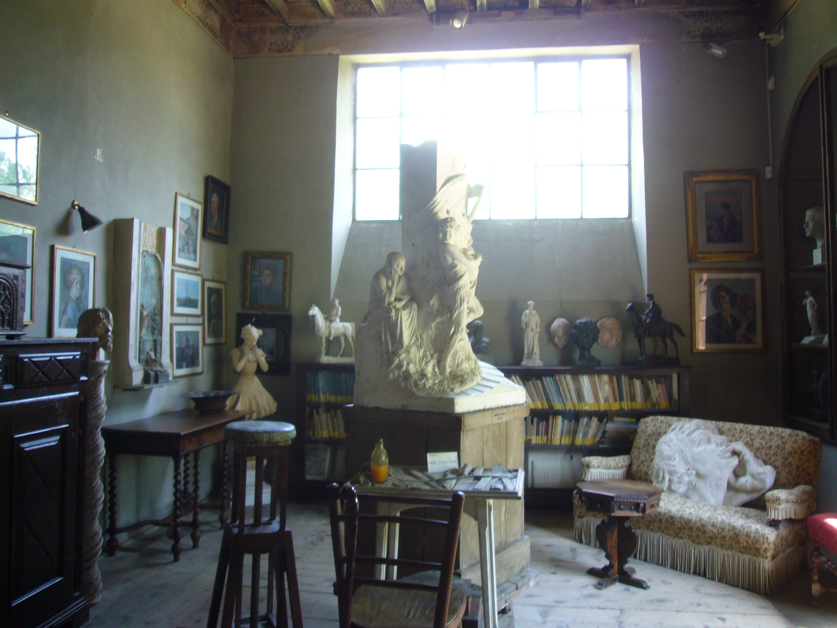 Roma, Museo Canonica a Villa Borghese. Appartamento dell'artista - studio